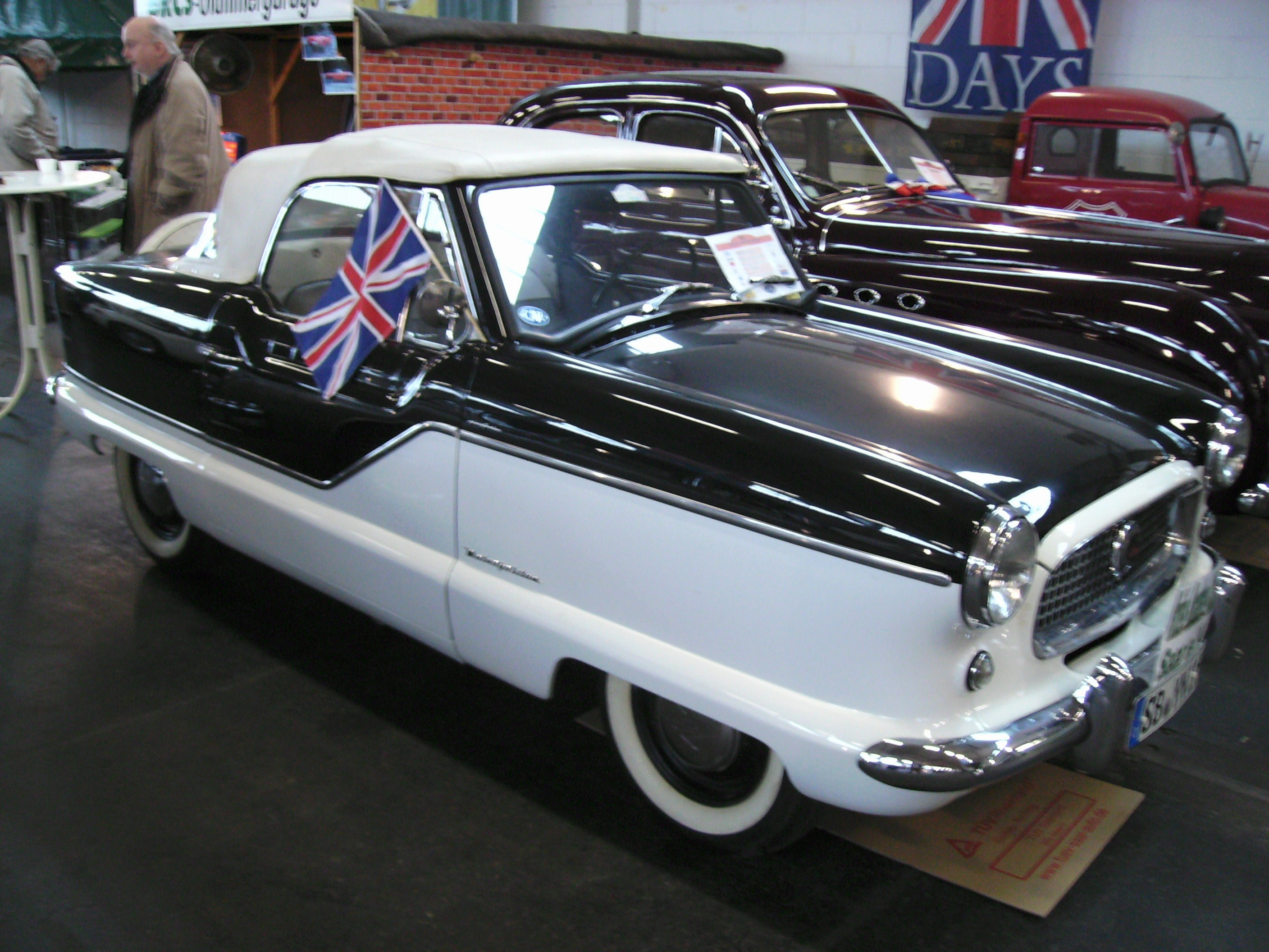 Nash Metropolitan (von Austin für Nash Motors gefertigt, 1959)